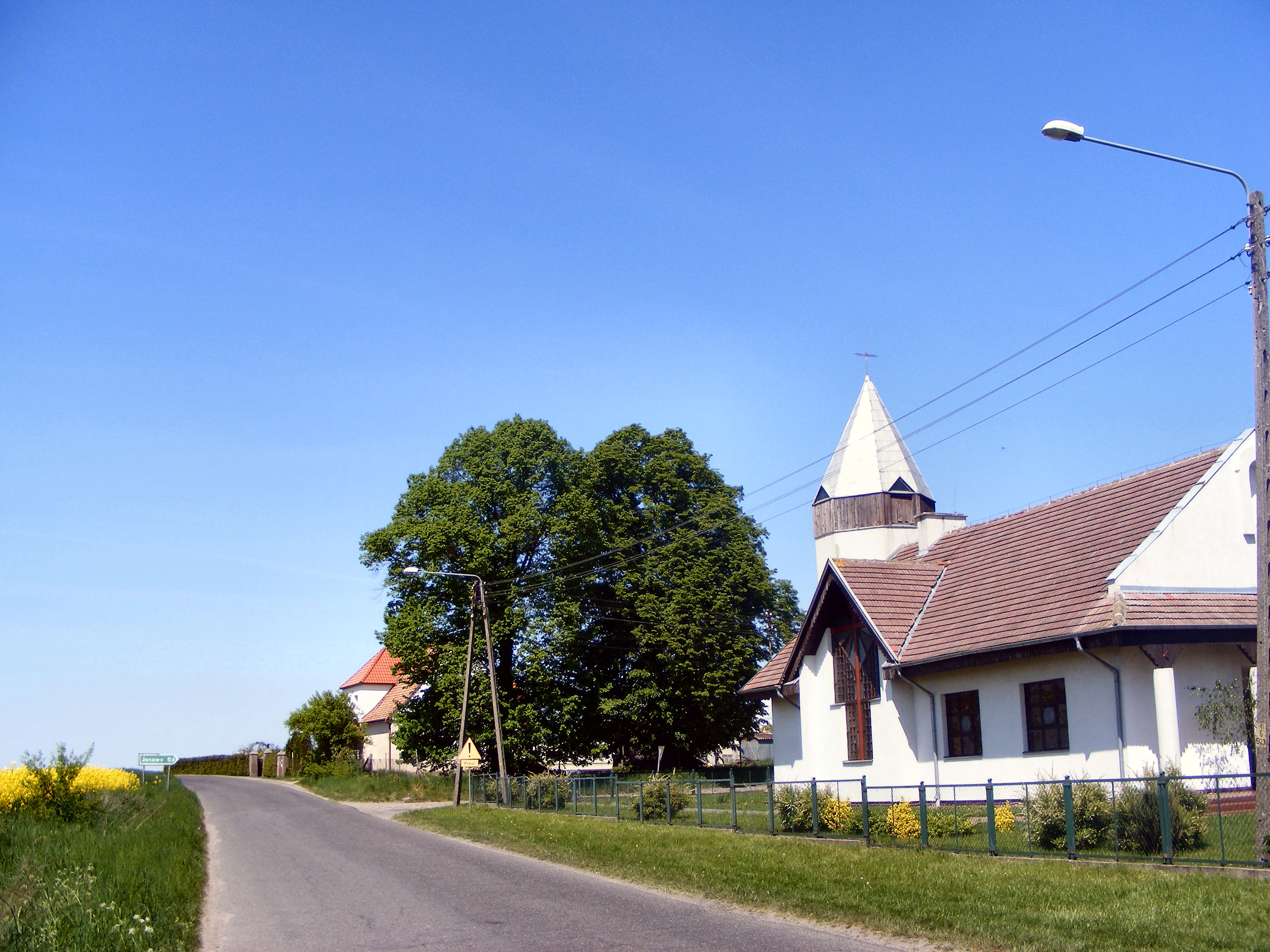 Osina – rzymskokatolicki kościół filialny p.w. Matki Bożej Bolesnej, 1990-1993